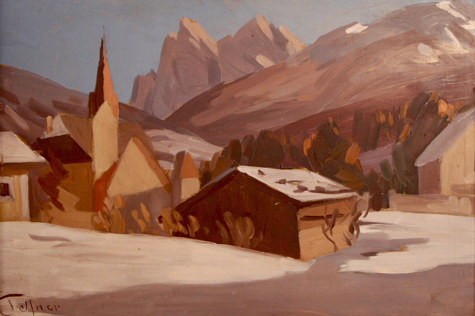 Villnöß mit Geislerspitzen, Ölgemälde von Josef Telfner